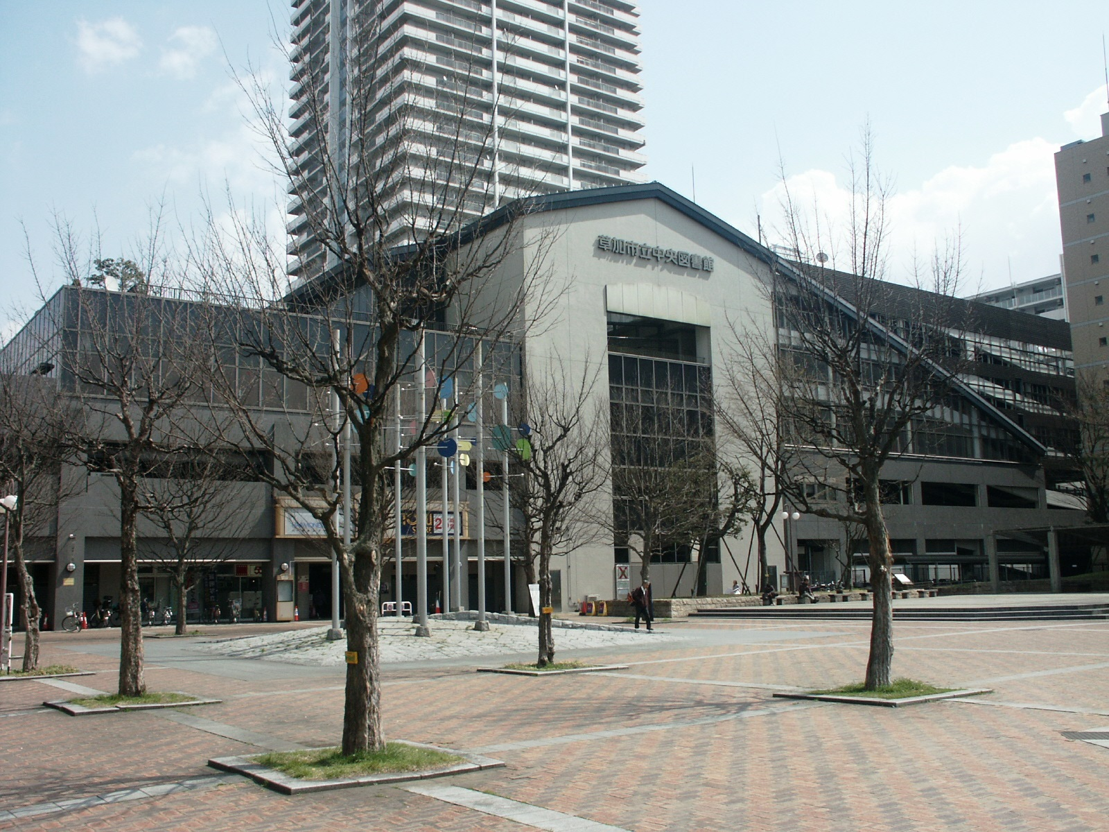 草加市立中央図書館（施設西側から撮影）